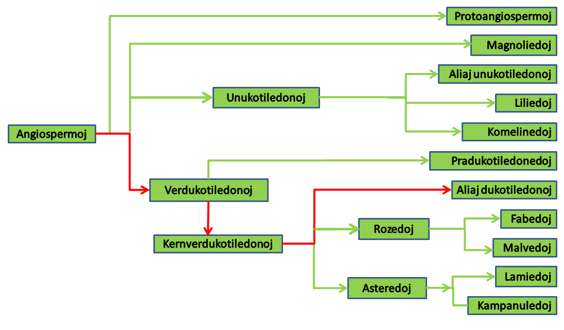 kernverdukotiledonoj nek rozedoj nek asteredoj